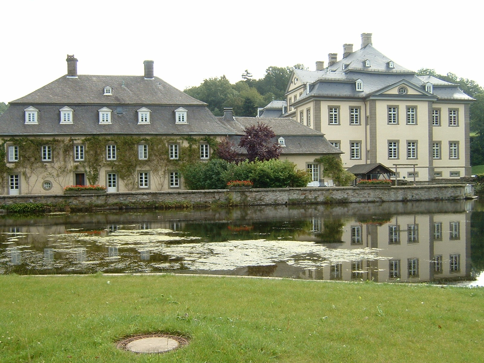 Schloss Körtlinghausen